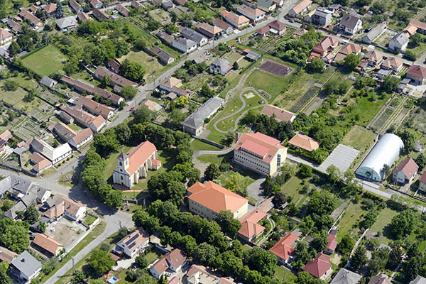 Légi fotó